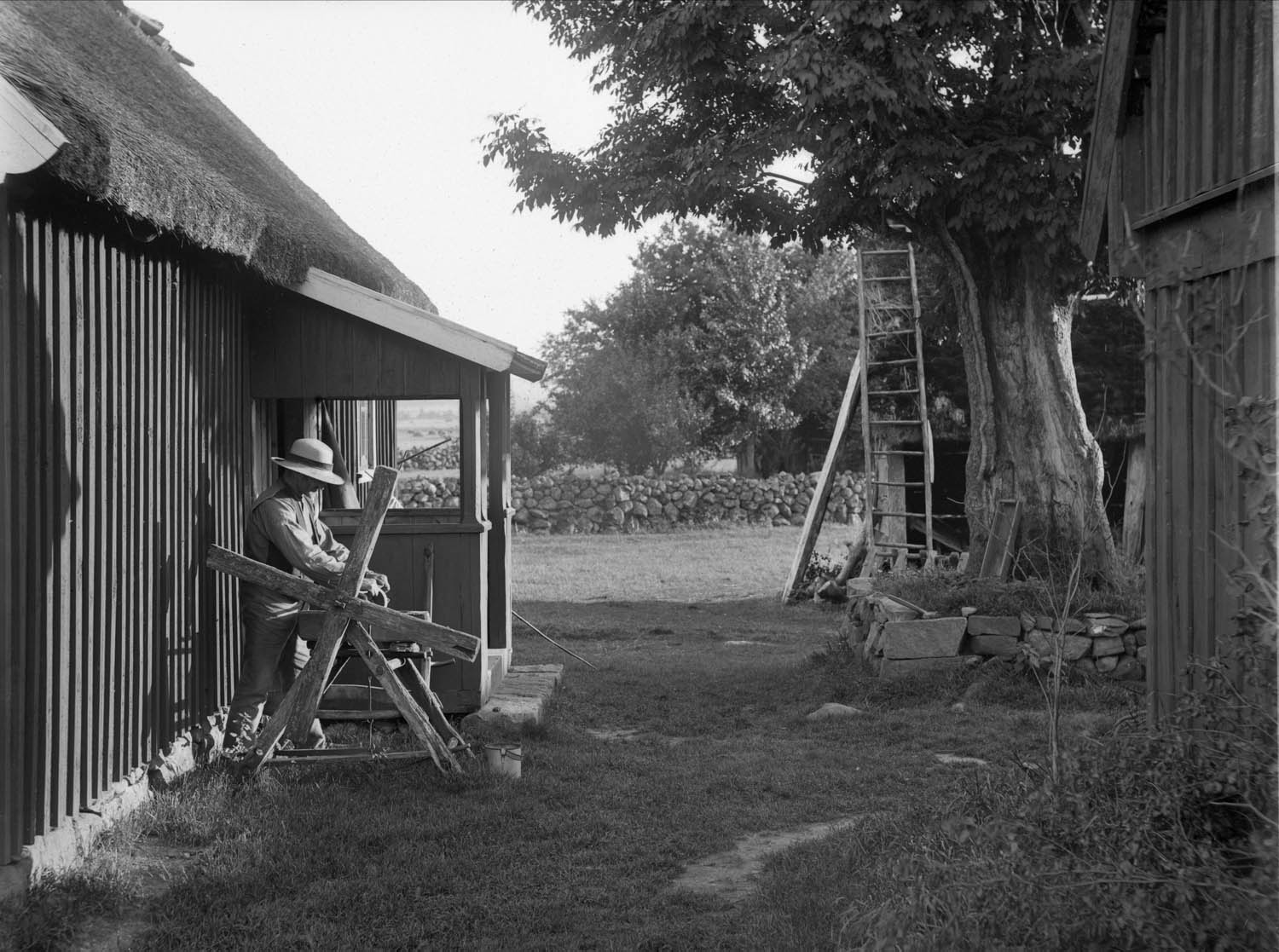 Depicted place: Halland, Årstads hd, Asige, Björsgård (Sverige (SE))